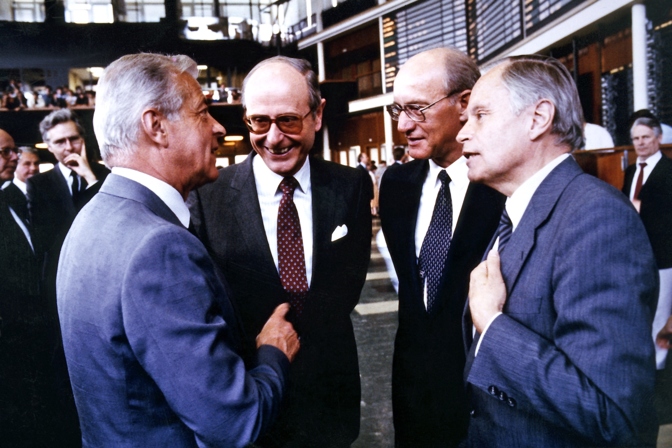 Einführung der Aktien der Nixdorf Computer AG an der Frankfurter Börse im Jahr 1984. Auf dem Bild zu sehen von links: Dr. F. Wilhelm Christians (Aufsichtsratsvorsitzender der Deutschen Bank), Dr. Herbert Zapp (Mitglied des Vorstandes der Deutschen Bank), Heinz Nixdorf (Vorstandsvorsitzender der Nixdorf Computer AG) und Dr. Gerhard Schmidt (Aufsichtsratsvorsitzender der Nixdorf Computer AG).